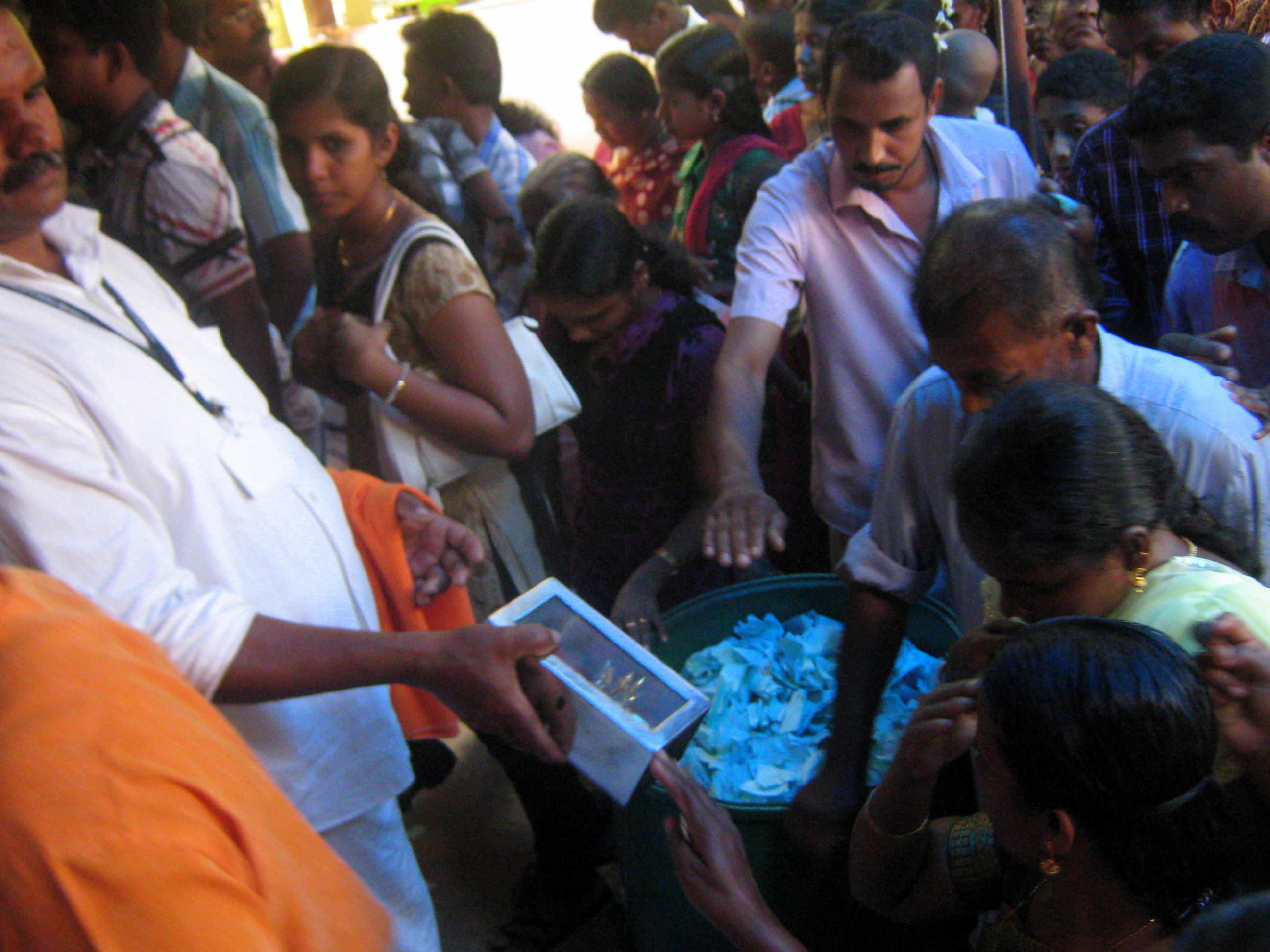 കൊരട്ടിമുത്തി തിരുനാള്‍ 2012